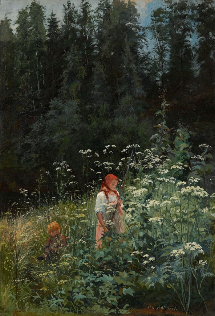 «Девочка в траве». 1880 г. Русская школа